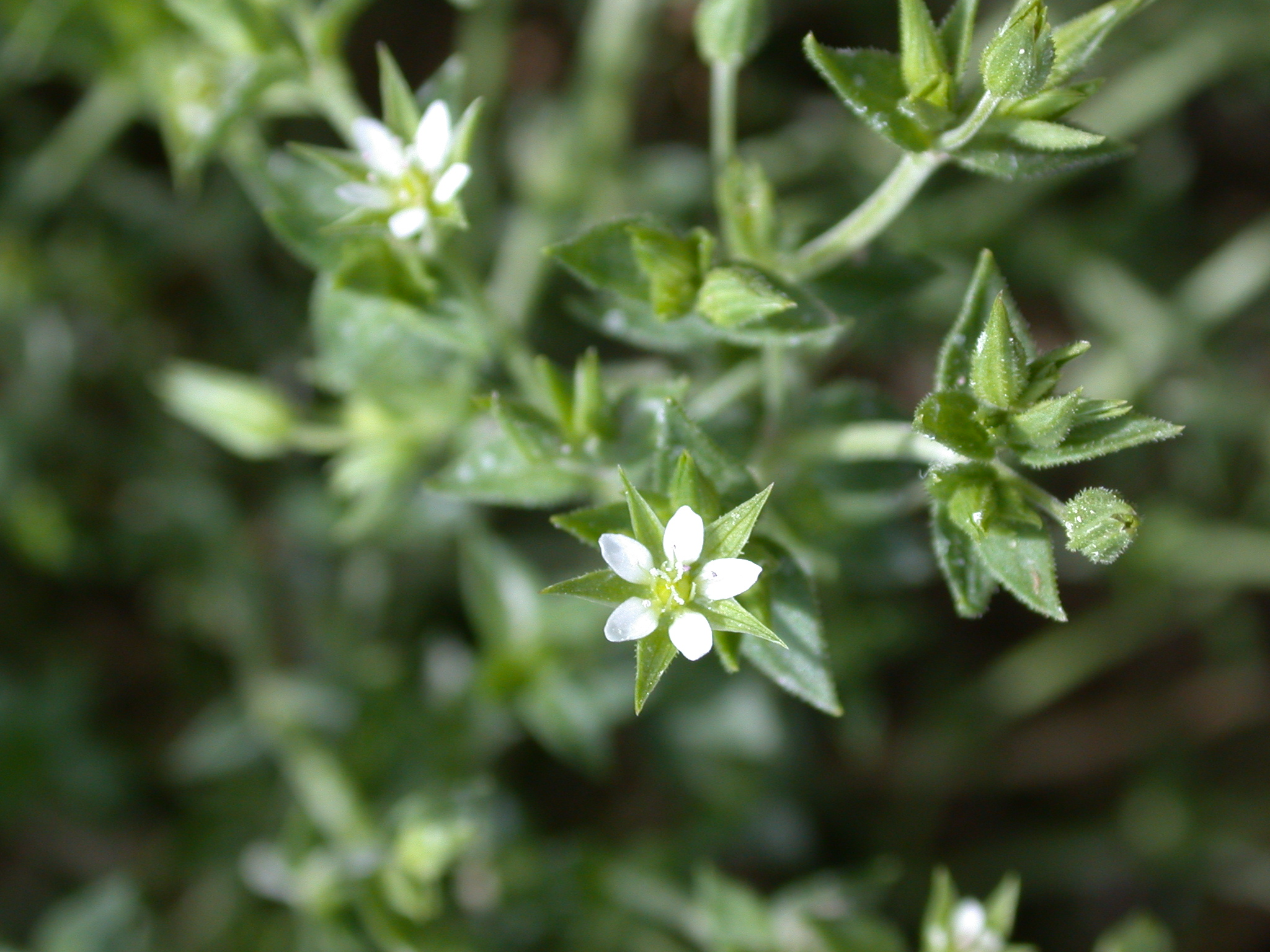 Arenaria serpyllifolia-ssp-leptoclados Brasles (Aisne), France